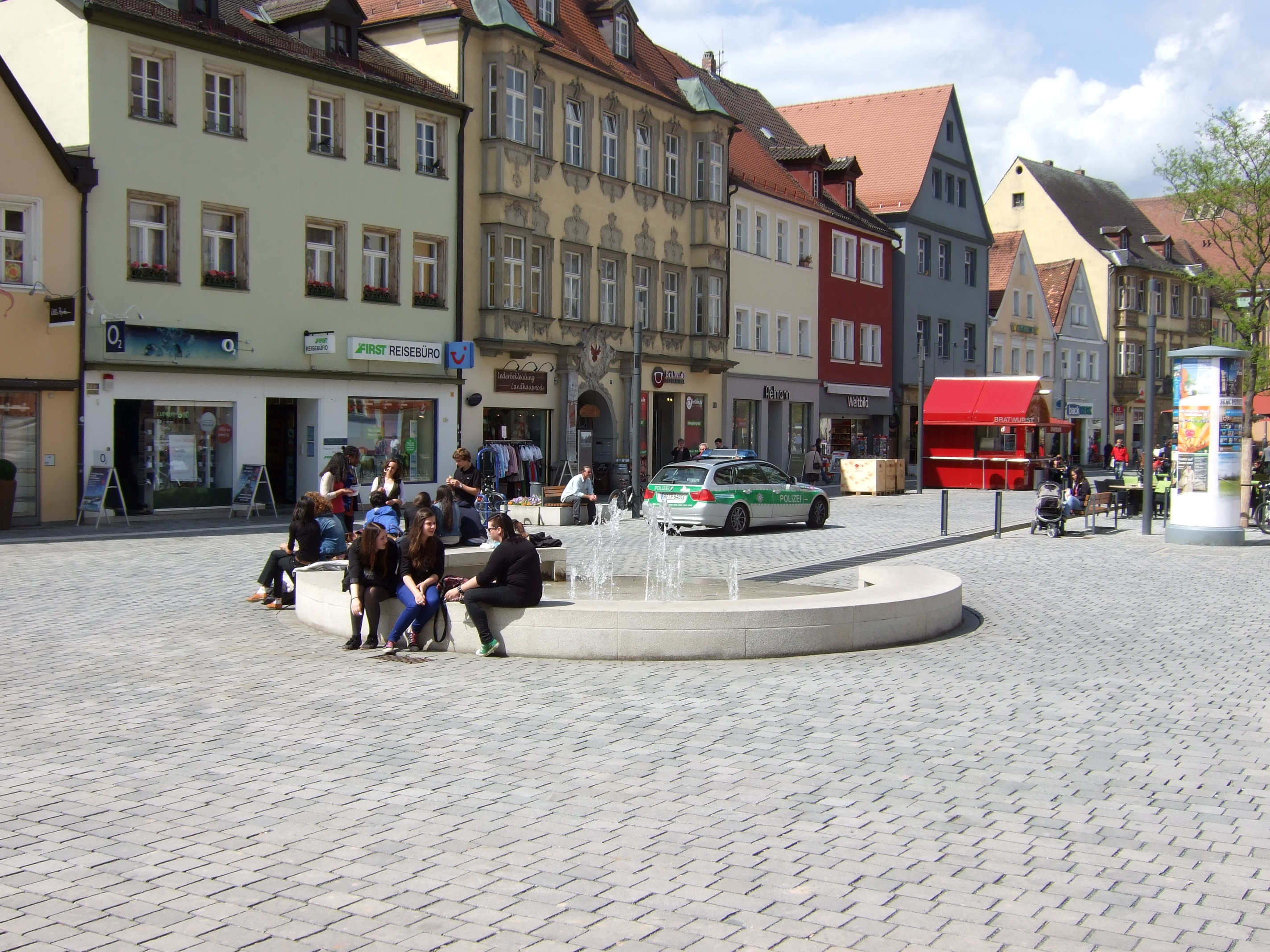 Neuer Brunnen Bayreuth am Markt